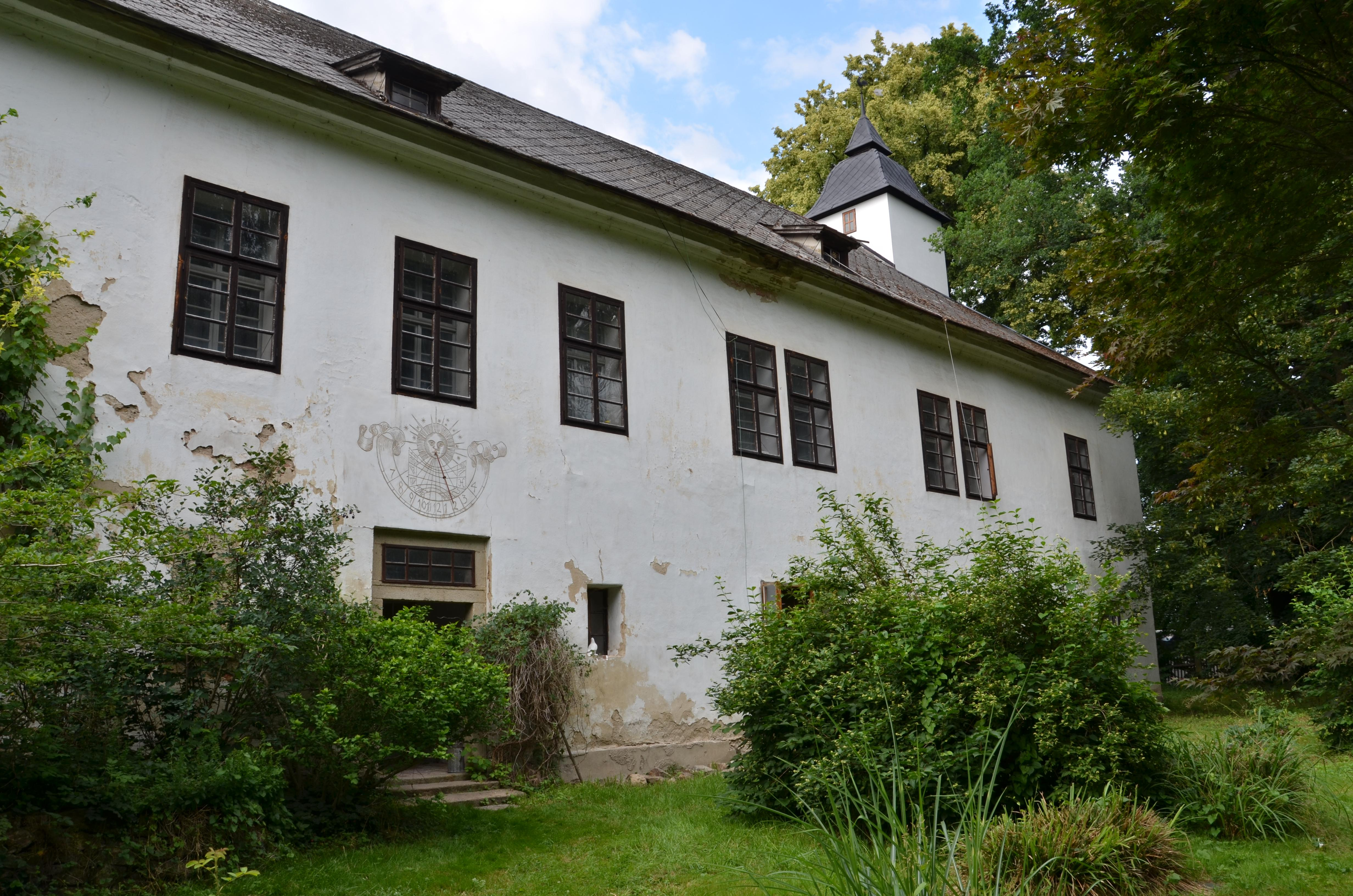 Statek Bohuslava Reynka, Petrkov 16. 6. 2018